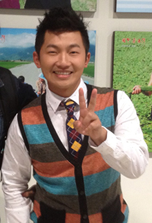 蔡昌憲在三立電視留影。